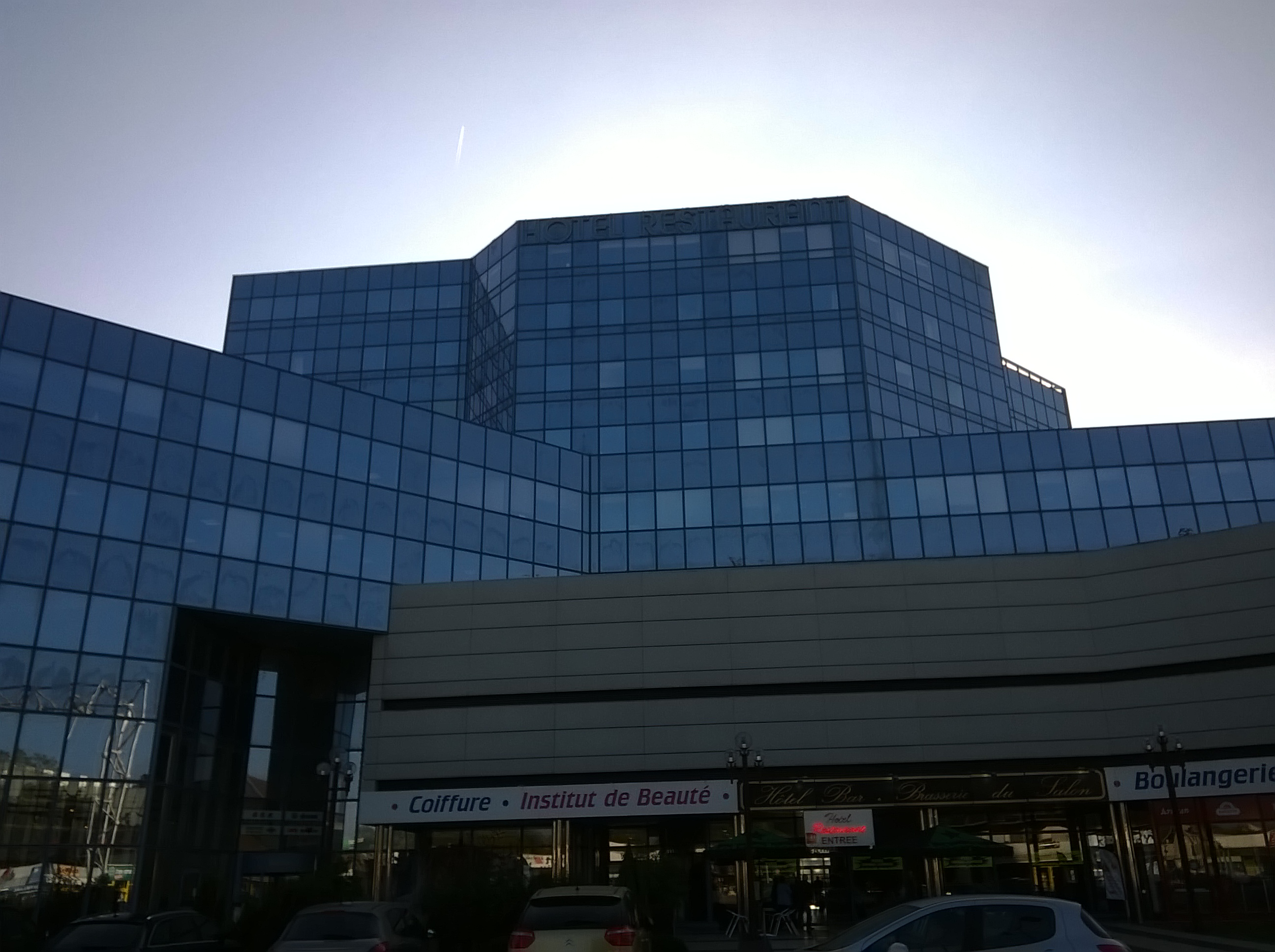 Dampierre-sur-Salon Hôtel